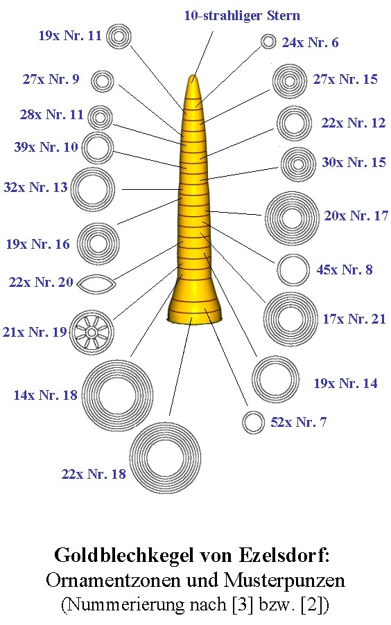 Übersicht der Ornamentzonen und verwandten Hauptmusterpunzen beim Goldblechkegel von Ezelsdorf-Buch